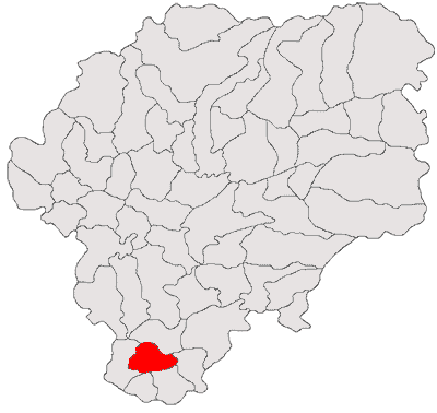 Categorie:Hărţi ale judeţului Bistriţa-Năsăud